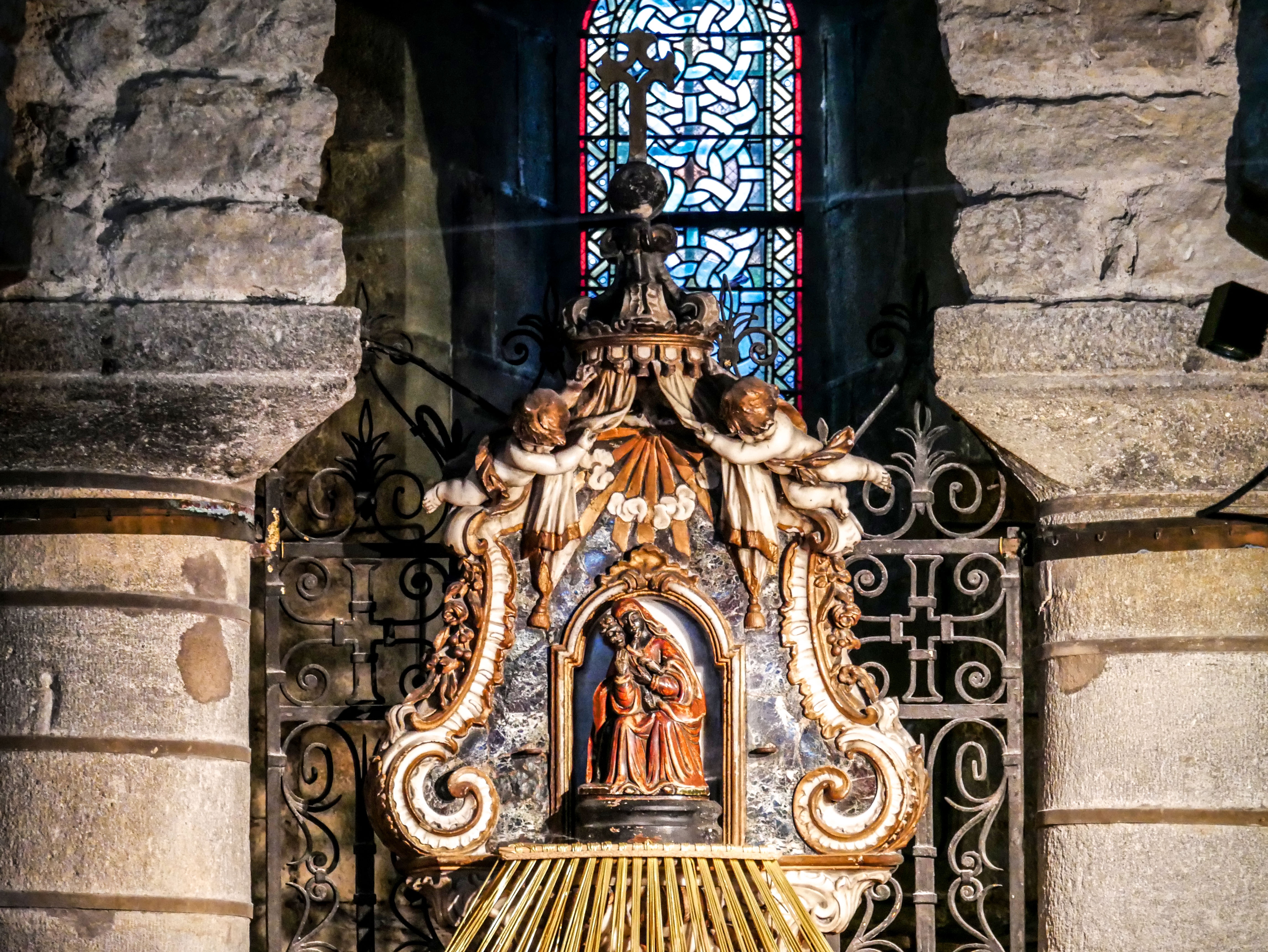 Vierge miraculeuse située dans la chapelle souterraine de Notre-Dame du Port (crypte) à Clermont-Ferrand